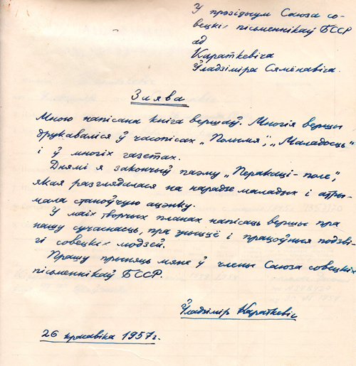 Заява Уладзіміра Караткевіча на ўступленне ў саюз пісьменнікаў БССР